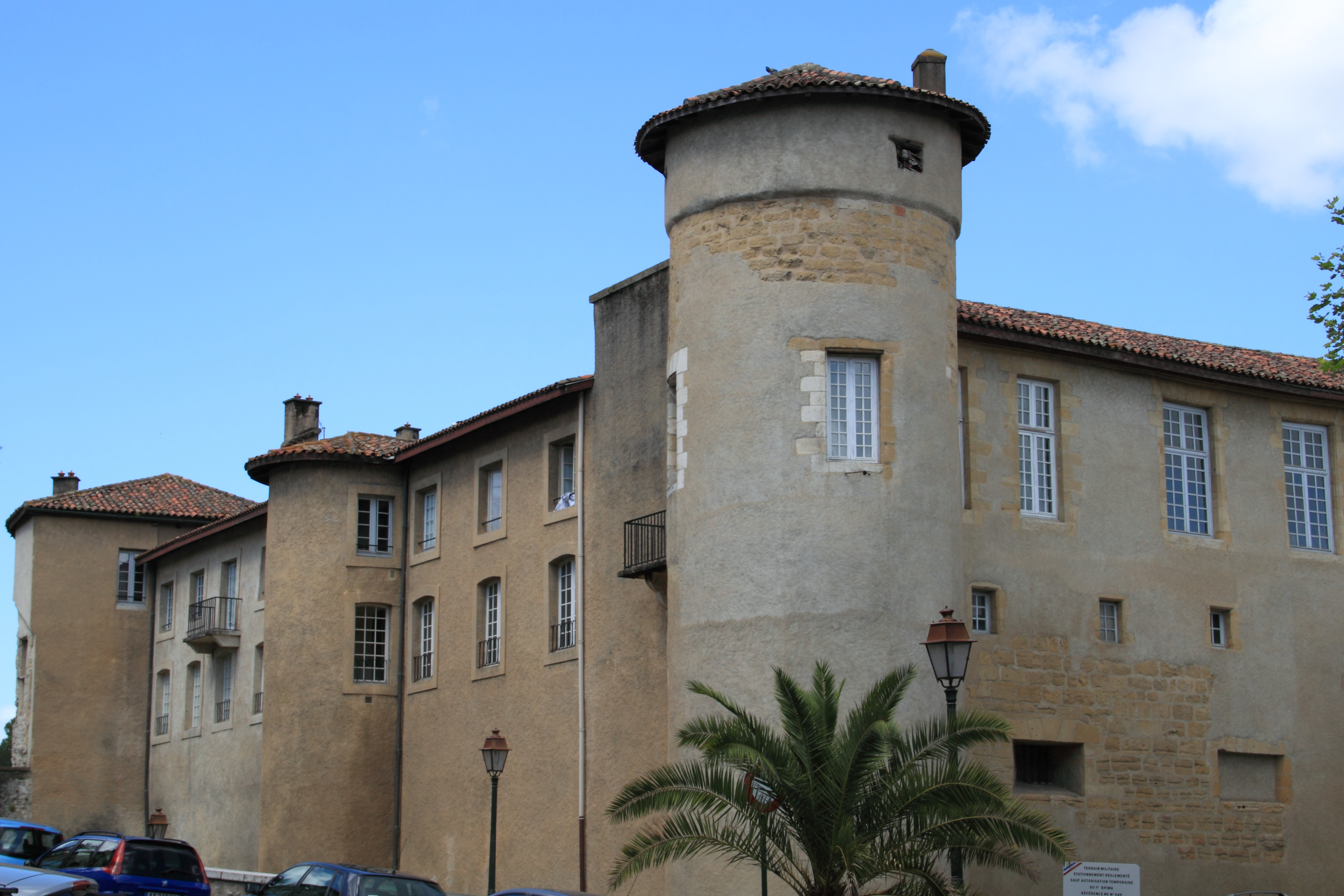 Château-Vieux (Bayonne)